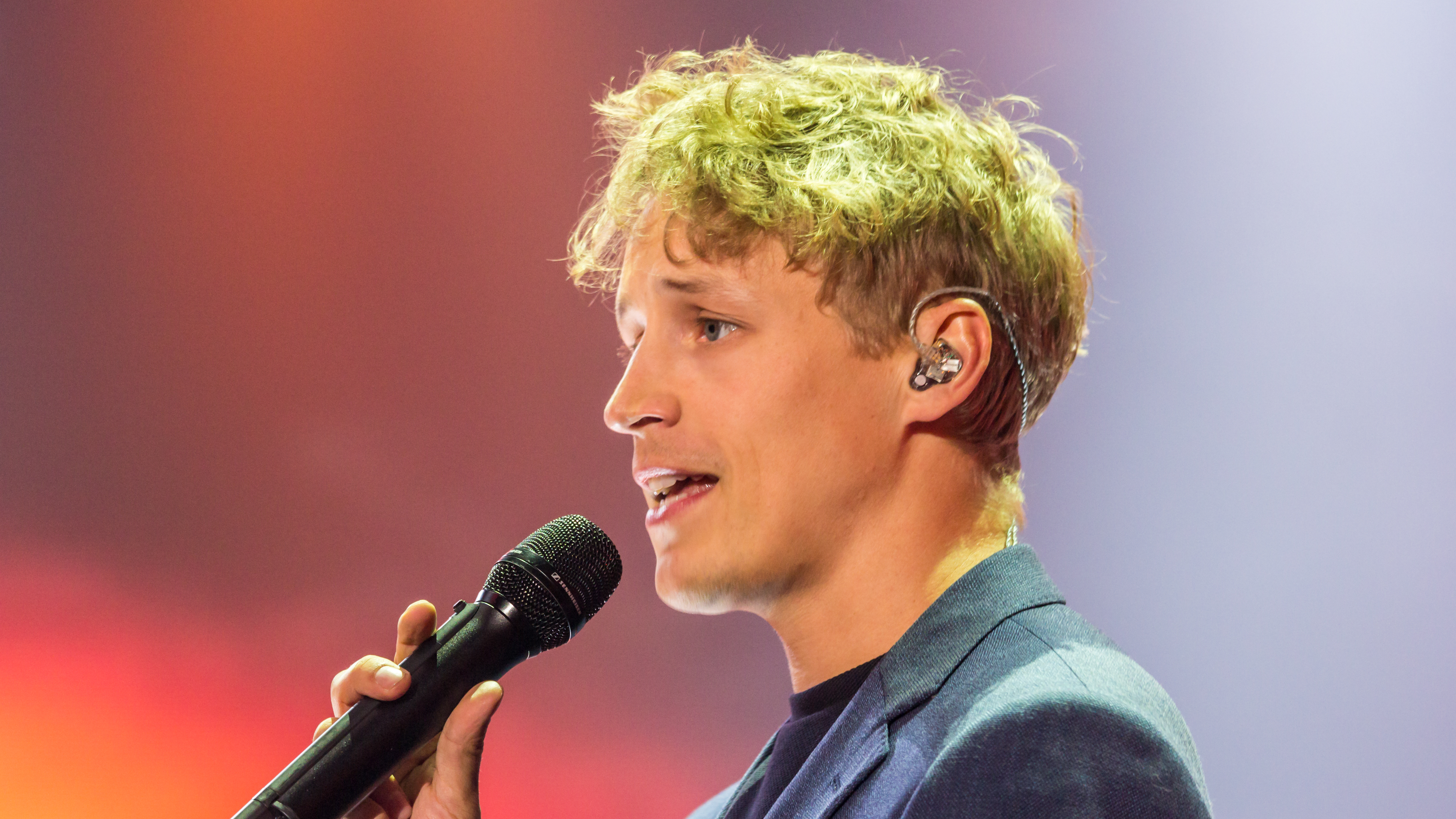 Unser Song 2017 - Generalprobe - Tim Bendzko